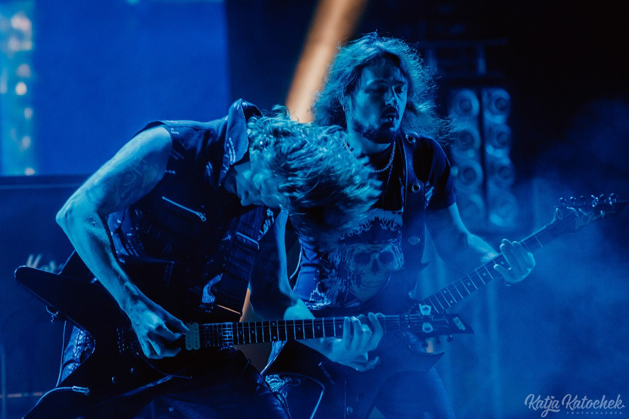 В.Молчанов и А.Голованов на фестивале Moscow Metal Meeting 30.08.2014